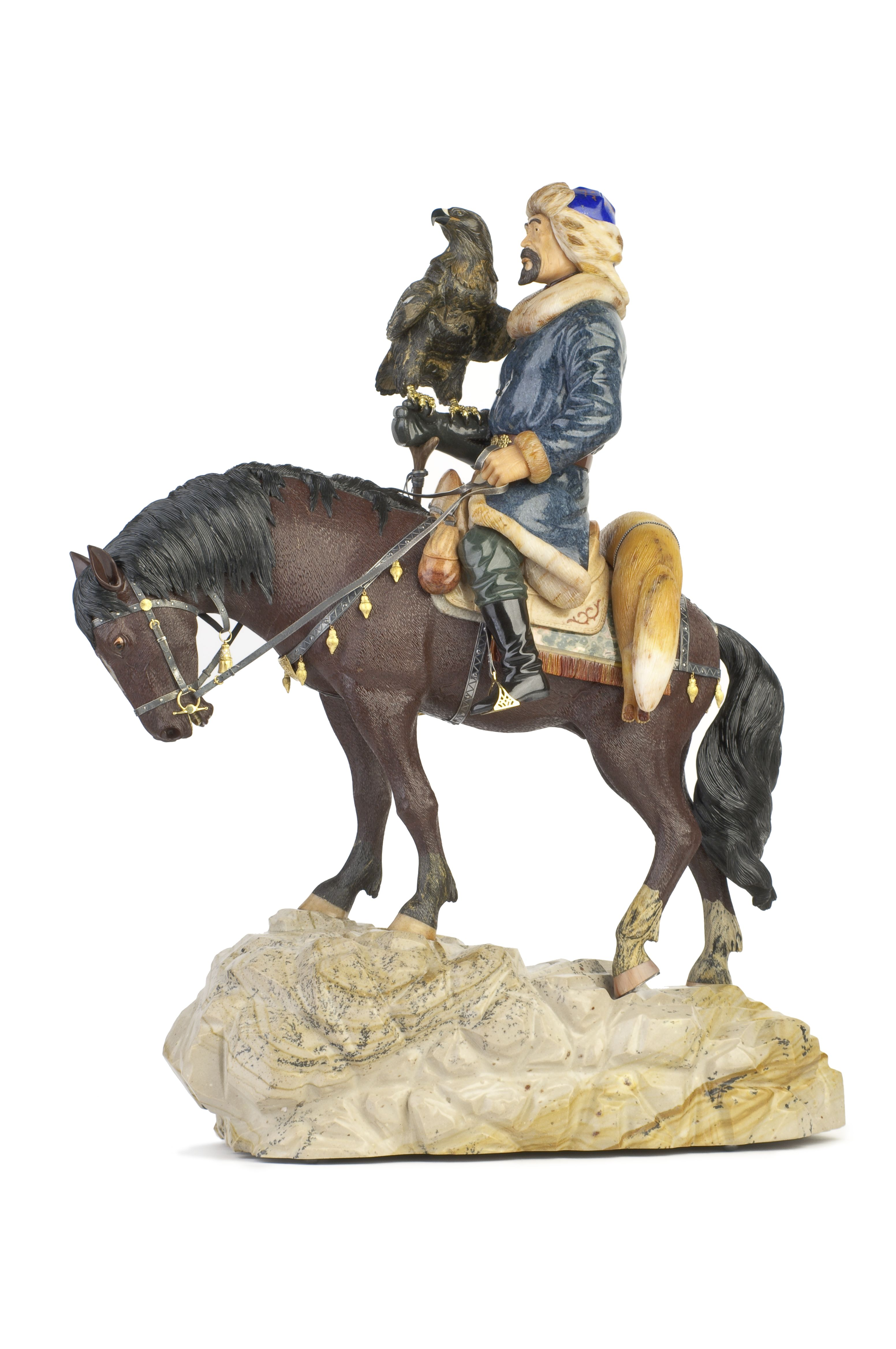 Интерьерная композиция "Беркутчи на лошади". Ювелирный дом Моисейкин